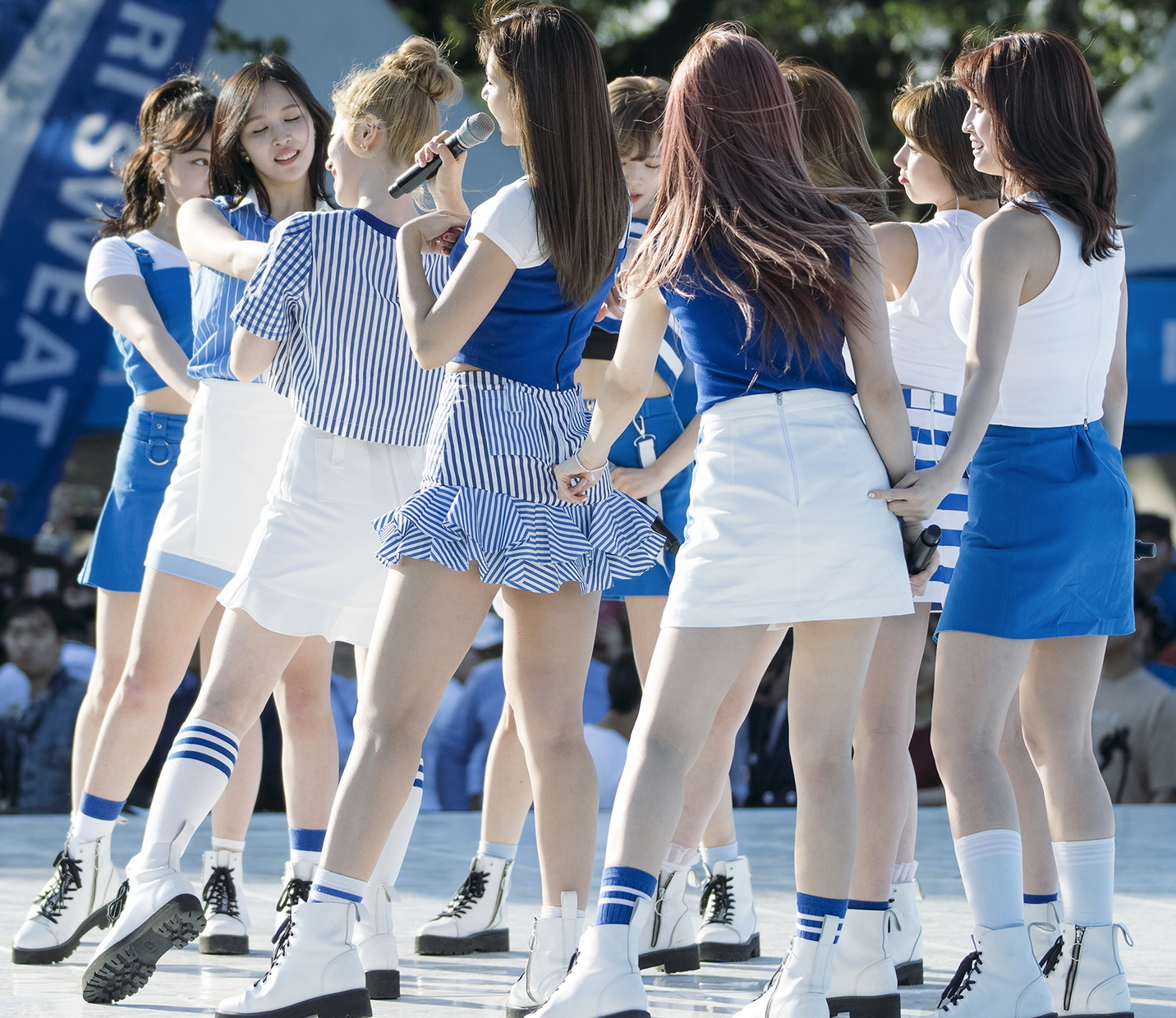 170514 포카리스웨트 30주년 블루런 행사 트와이스